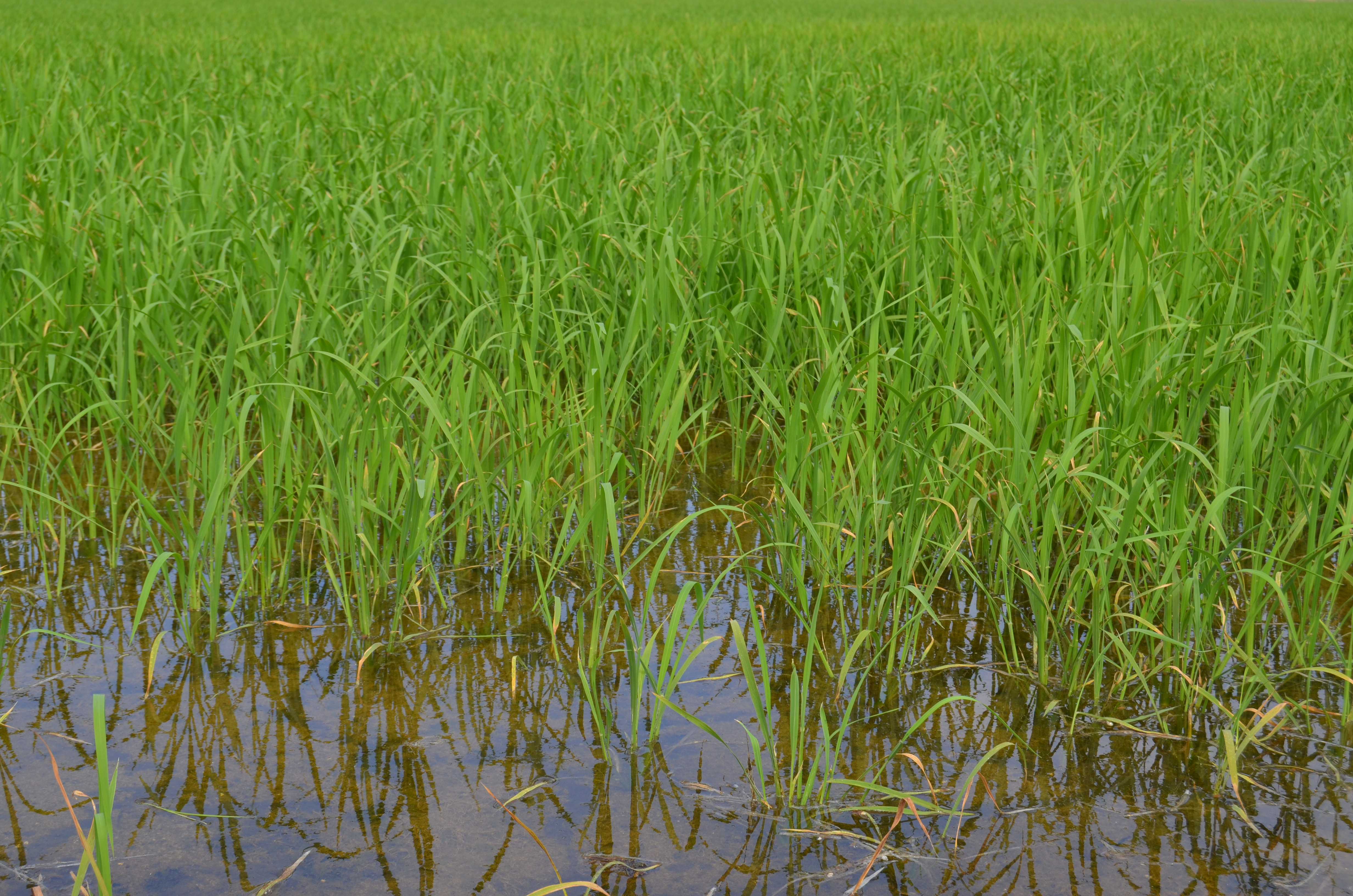 Parque natural del Marjal de Pego-Oliva This is a photography of a Site of Community Importance in Spain with the ID: ES0000147. Natura2000 entry, EEA entry